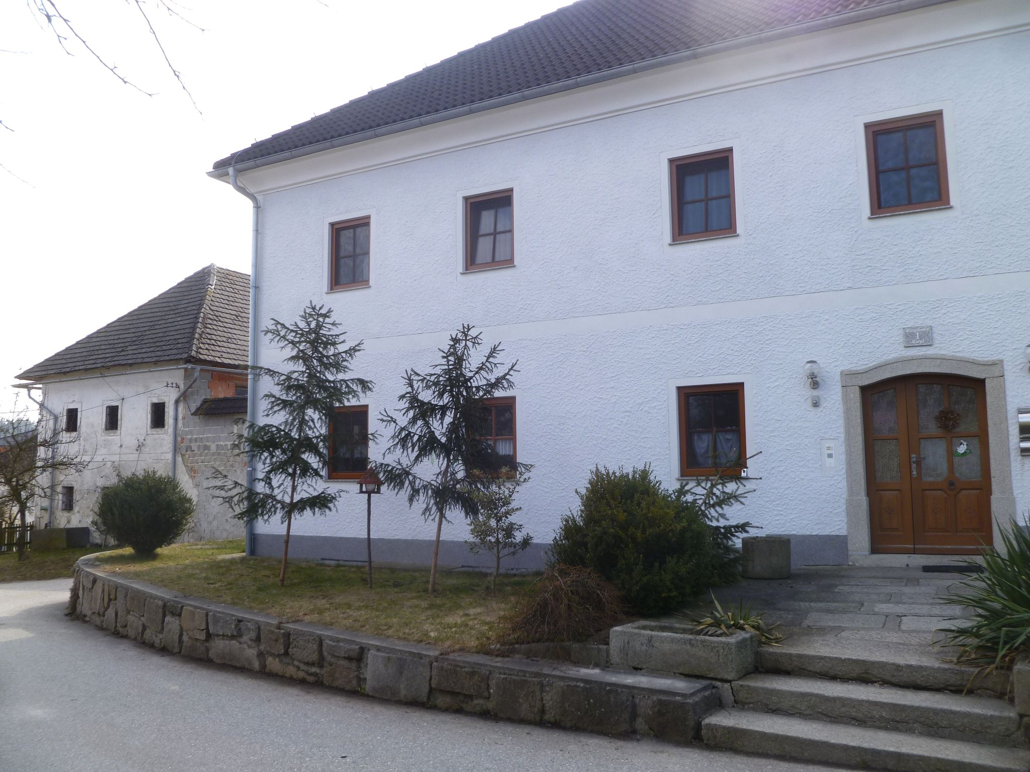 Bad_Zell-Habichrigl (Bauernhof)